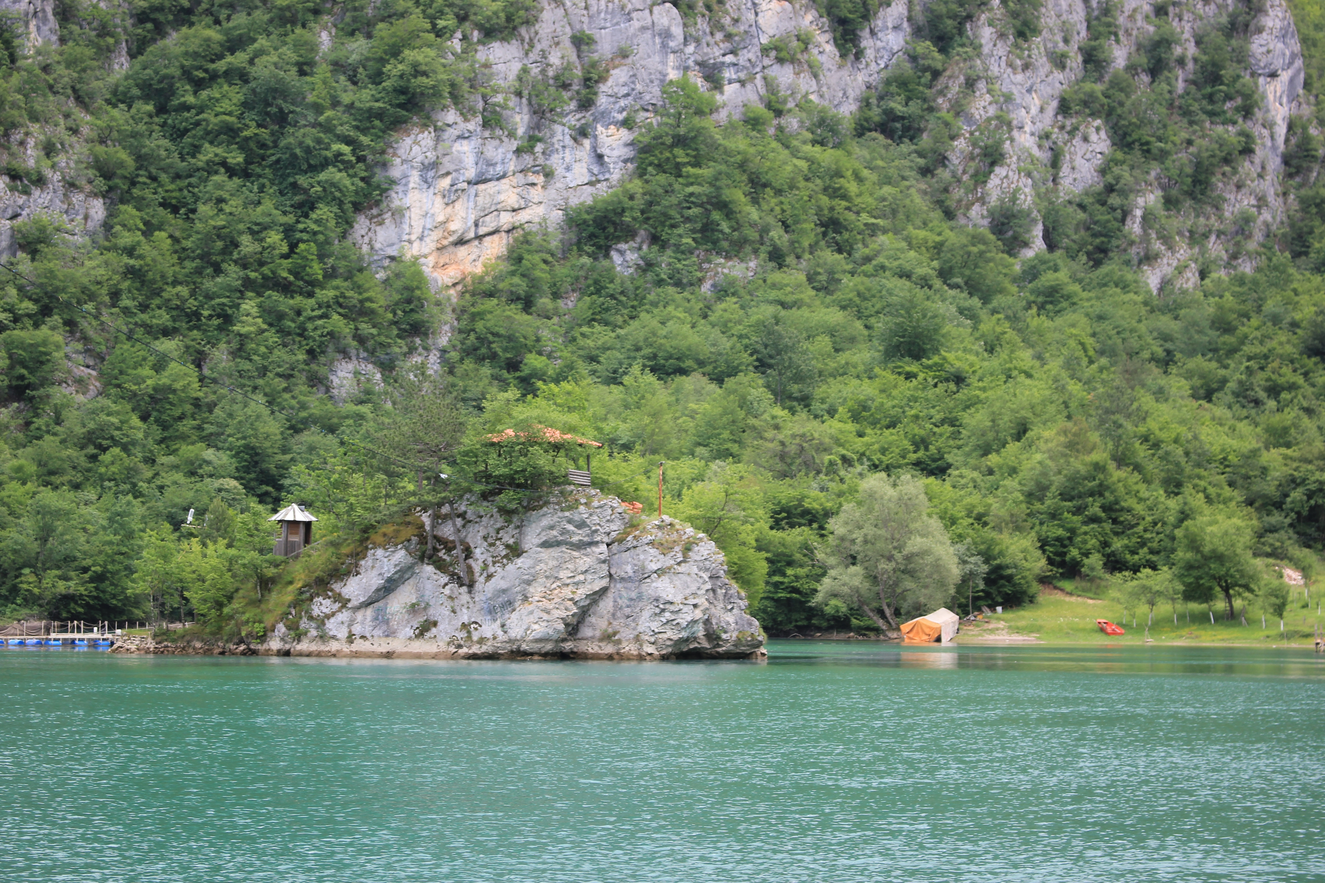 Die Drina in Slap, Gemeinde Rogatica